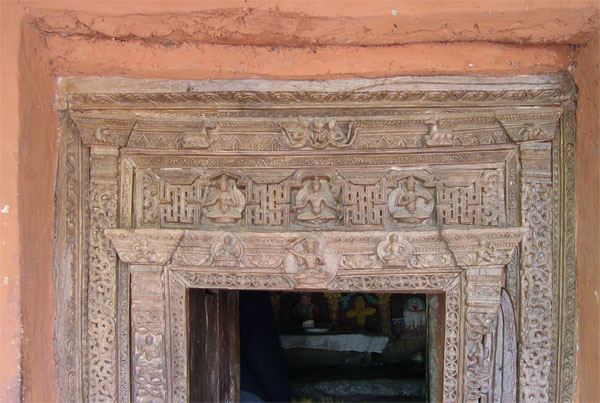 Alchi Choskhor, Temple de Manjushri. Ladakh, Jammu i Caixmir, Índia